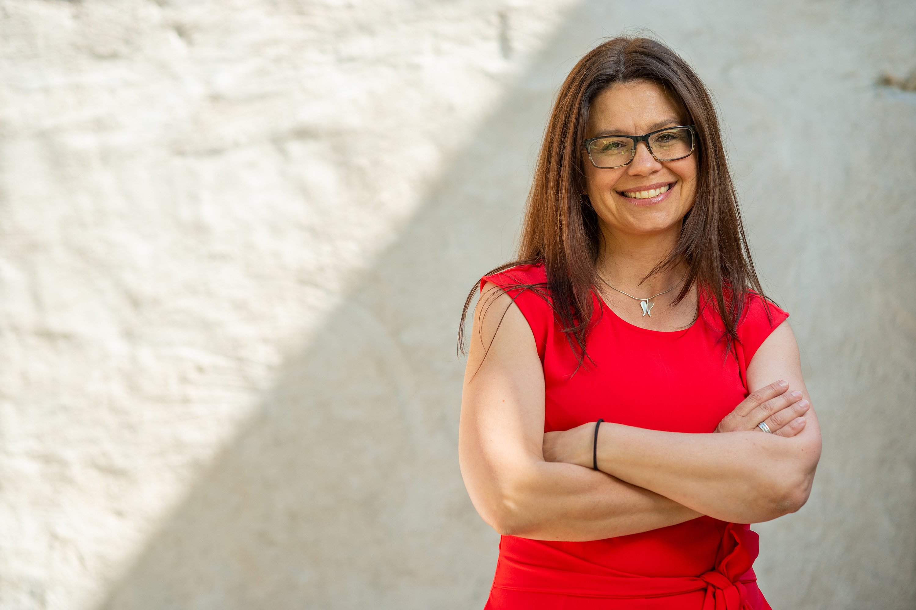 Helena Lindahl, Riksdagsledamot för Centerpartiet.